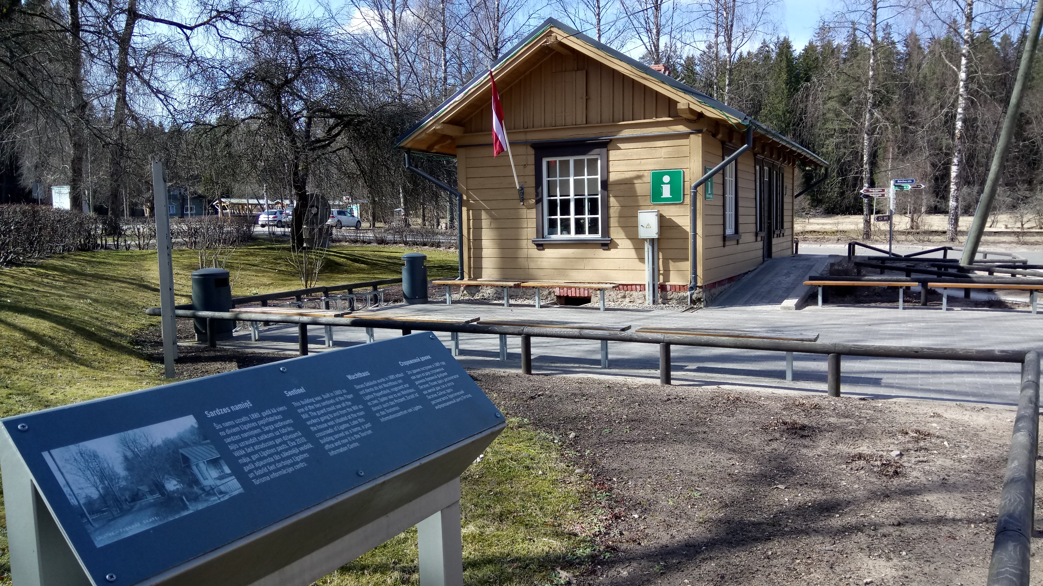 Sardzes nams mūsdienās - Līgatnes Tūrisma Informācijas centrs